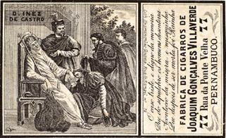 Rótulo de cigarro. D. Inez de Castro. A coleção Brito Alves é composta de 1.252 rótulos de cigarros na técnica litográfica. Foi iniciada pelo comerciante Vicente de Brito Alves e continuada pelo seu filho, o advogado pernambucano José de Brito Alves (1887-1963). Em 1964 a coleção foi doada pela família ao então Instituto Joaquim Nabuco de Pesquisas Sociais. Constitui-se em um raro e valioso patrimônio cultural e artístico, registrando fatos históricos, usos, costumes e aspectos da vida cultural da sociedade brasileira e particularmente da pernambucana, no final do século XIX até as primeiras décadas do século XX.